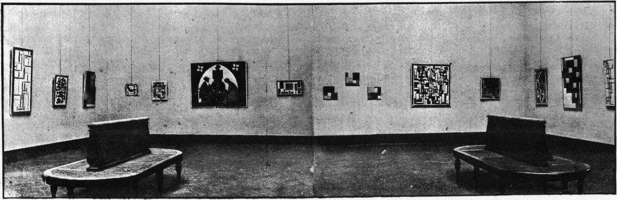 Theo van Doesburg. Ontwikkelingstentoonstelling in Weimar. nl:1923. Foto. Afkomstig uit De Stijl, 6e jaargang, nummer 6/7 (1924): ill. tussen p. 84 en 85. Op deze foto zijn te zien, v.l.n.r., de schilderijen: Ritme van een Russische dans. Juni 1918. 135,9 Ã— 61,6 cm. New York, Museum of Modern Art. Compositie XII in zwart en wit. 1918. 74,5 Ã— 54,5 cm. Bazel, Kunstmuseum. Compositie XX. 1919-1920. 92 Ã— 71 cm. Madrid, Museo Thyssen-Bornemisza. Stilleven. 1916. 35 Ã— 40 cm. Birmingham, V.S., collectie H. Lewis-Winston. Compositie XIII (vrouw in atelier). 1918. 51 Ã— 39,5 cm. Winterthur, Kunstmuseum. De kaartspelers. 1916-1917. Olieverf en tempera op doek. 117 Ã— 147,5 cm. â€™s-Gravenhage, Gemeentemuseum Den Haag. Compositie VIII (De koe). Circa 1917. 37,5 Ã— 63,5 cm. New York, Museum of Modern Art. Compositie XVIII in drie delen. 1920. Ieder vierkant 35 Ã— 35 cm. Otterlo, KrÃ¶ller-MÃ¼ller Museum. Compositie IX, Opus 18 (de Kaartspelers). 1917. 116 Ã— 106,5 cm. â€™s-Gravenhage, Gemeentemuseum Den Haag. Compositie XIV. 1918. 29,5 Ã— 36 cm. ZÃ¼rich, Galerie Proarta (2006). Compositie in grijs (Rag-Time). 1919. 95 Ã— 58,5 cm. VenetiÃ«, Peggy Guggenheim Collectie. Puur schilderij. 1920. Olieverf op doek. 130 Ã— 80,5 cm. Parijs, Centre Pompidou. Compositie XII (Tarantella). 1918. Verblijfplaats onbekend.